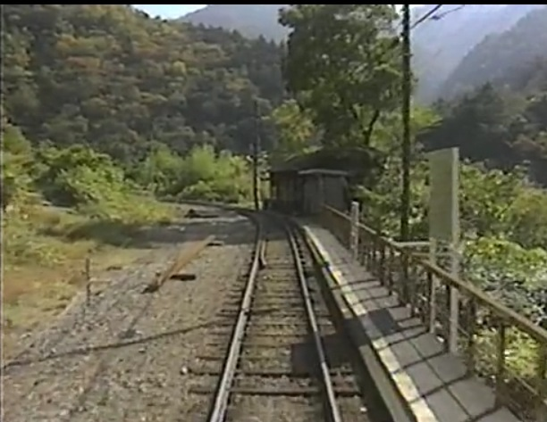 水没前の川根唐沢駅【全体】 H2年撮影。